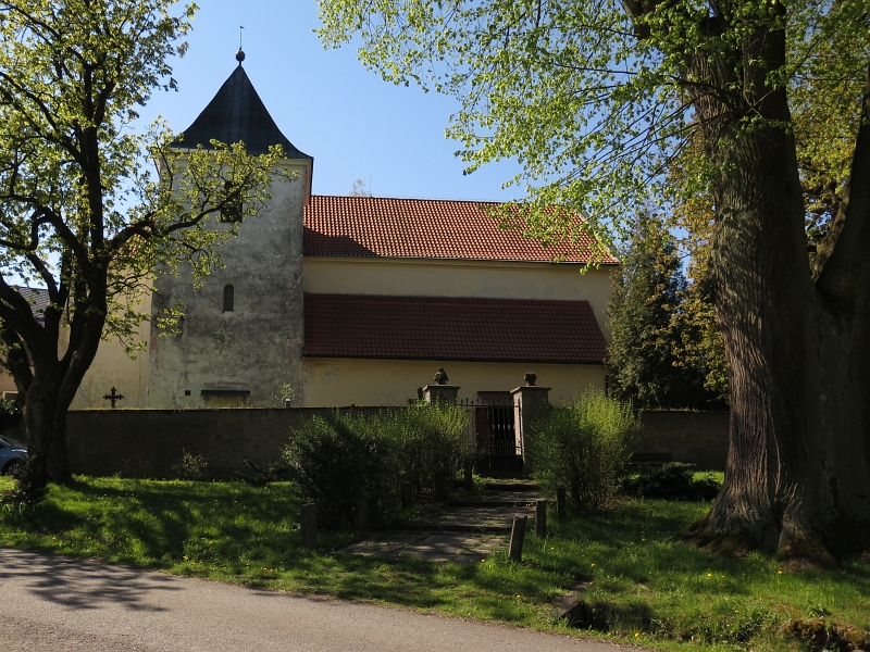 Kostel svatého Havla, Střezimíř.